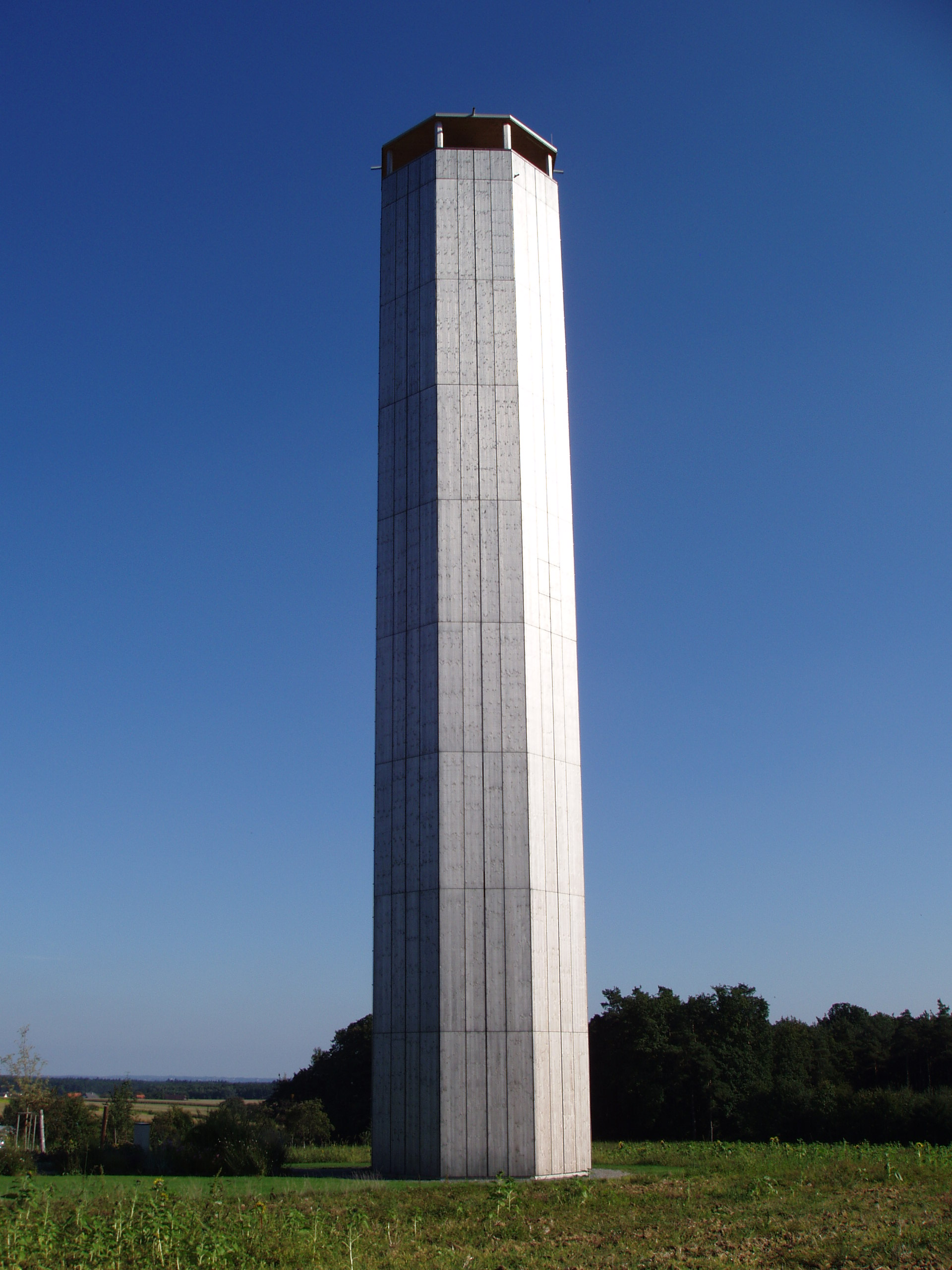 Oktogon bei Auffen, Großhart